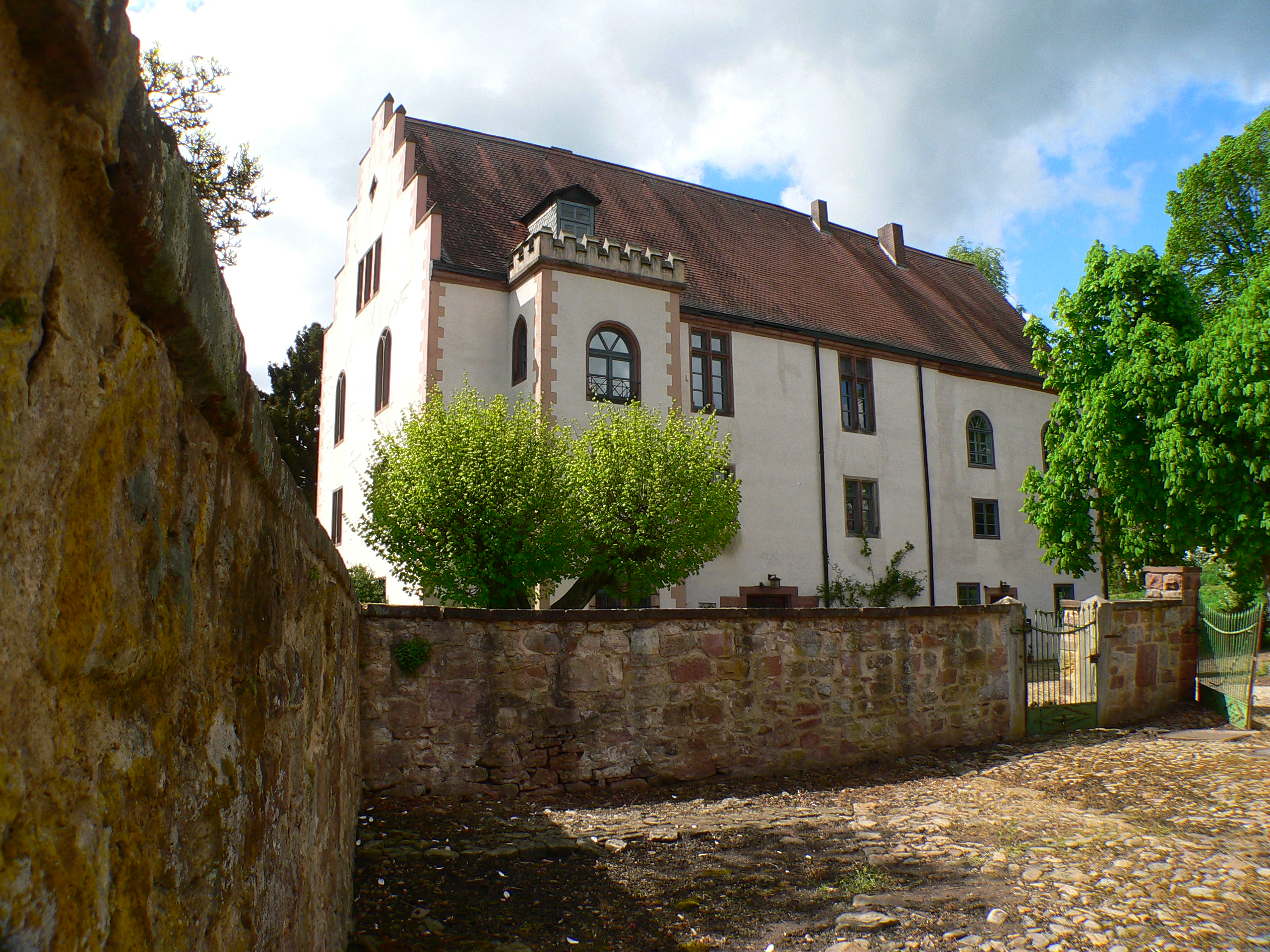 Schloss Gilsa (Oberhof) in Neuental-Gilsa, Hessen, Regierungsbezirk Kassel, Schwalm-Eder-Kreis